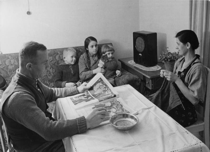 So siedelt der deutsche Arbeiter 14. Nach Feierabend sitzt die Arbeiter-Siedlerfamilie in der Wohnstube beisammen, und lauscht der Musik aus dem Radio und bespricht die Freuden und Sorgen des Tages.